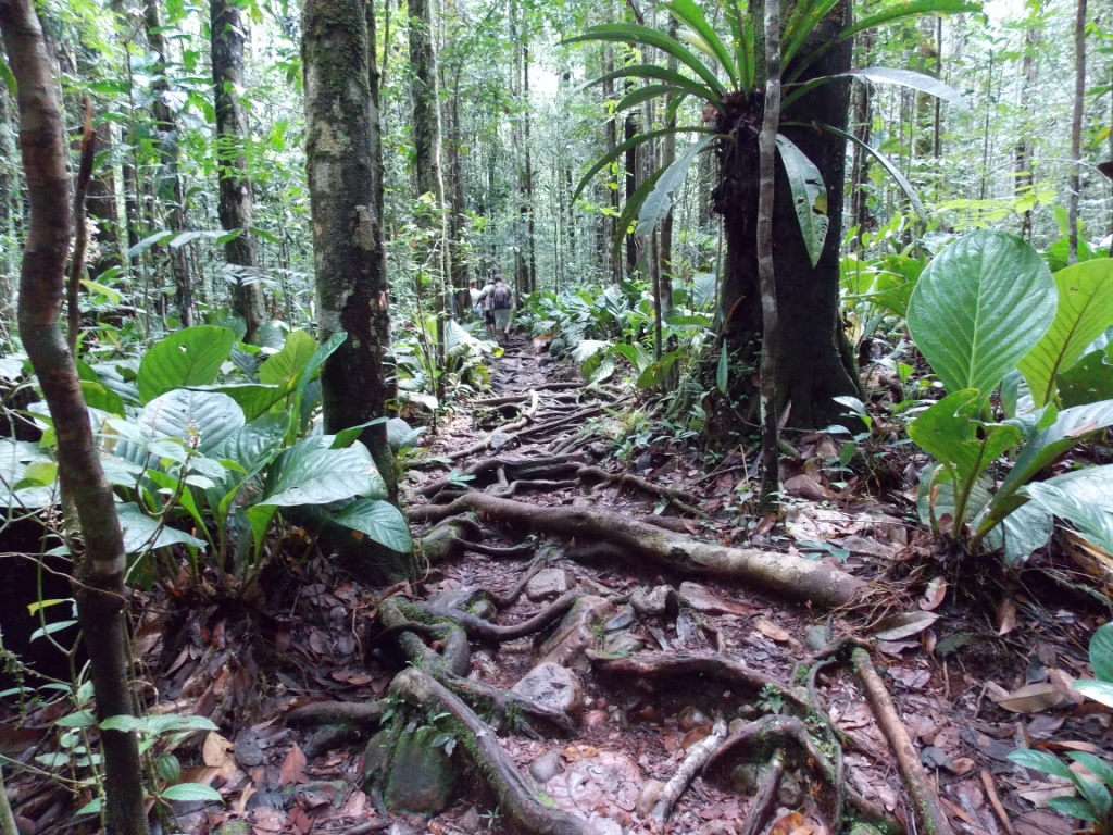 Ascenso hacia el Kerepacupai Vena (Salto Angel)